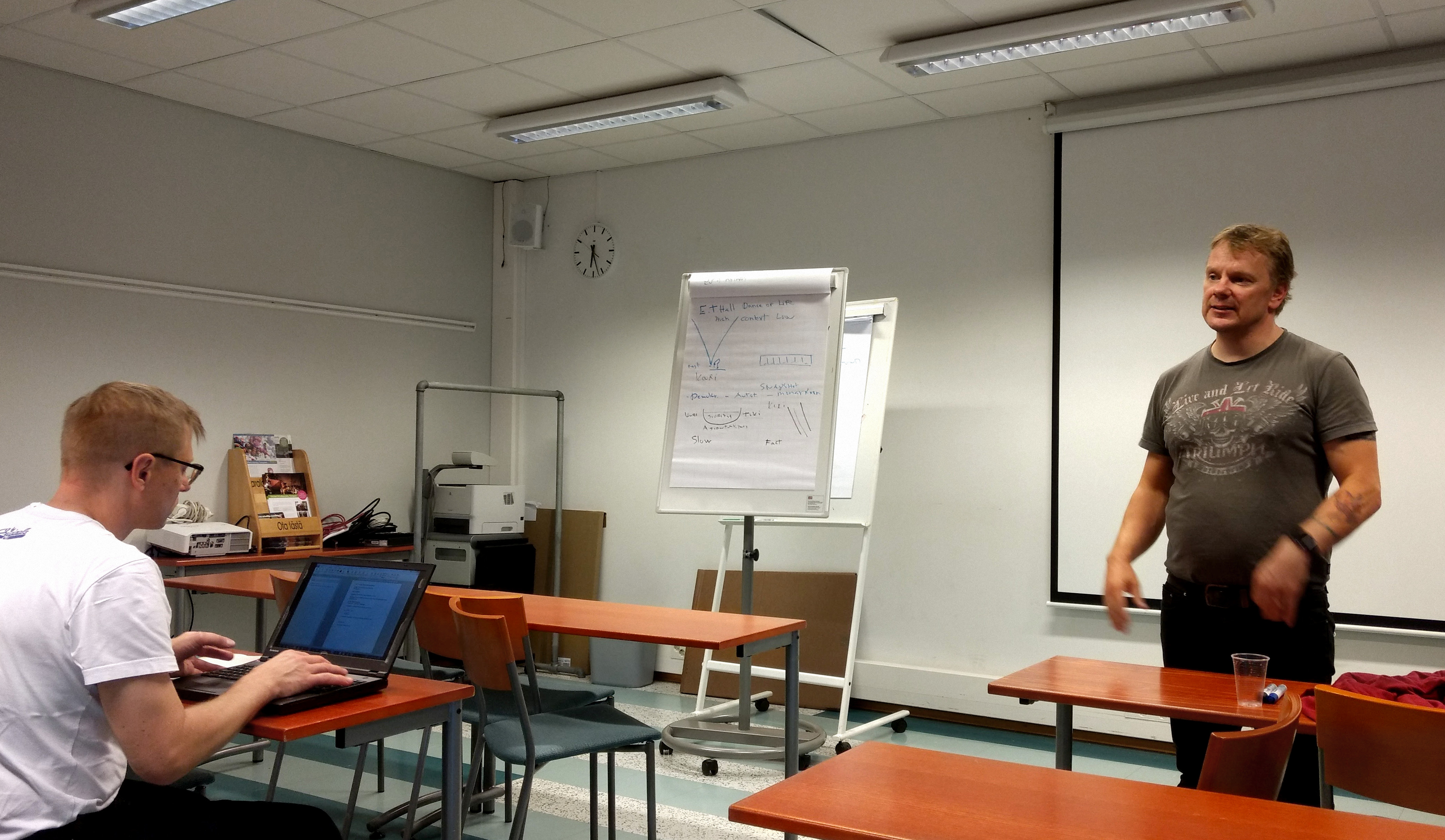 Valmentajien ammattitutkinnon kurssi Varalan urheiluopistossa, Tampereella. Opettajana valmentaja Marko Malvela.